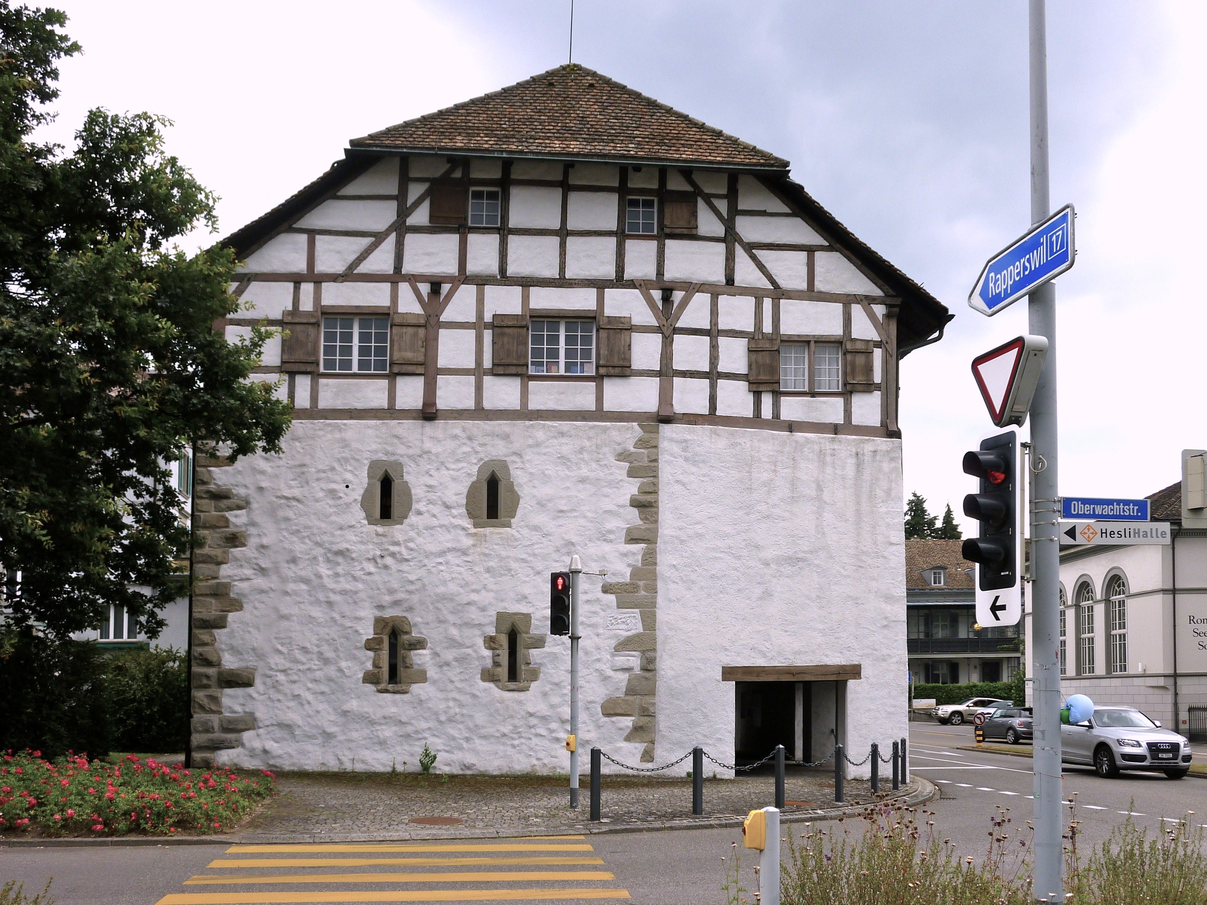 Höchhus Küsnacht: Nordseite